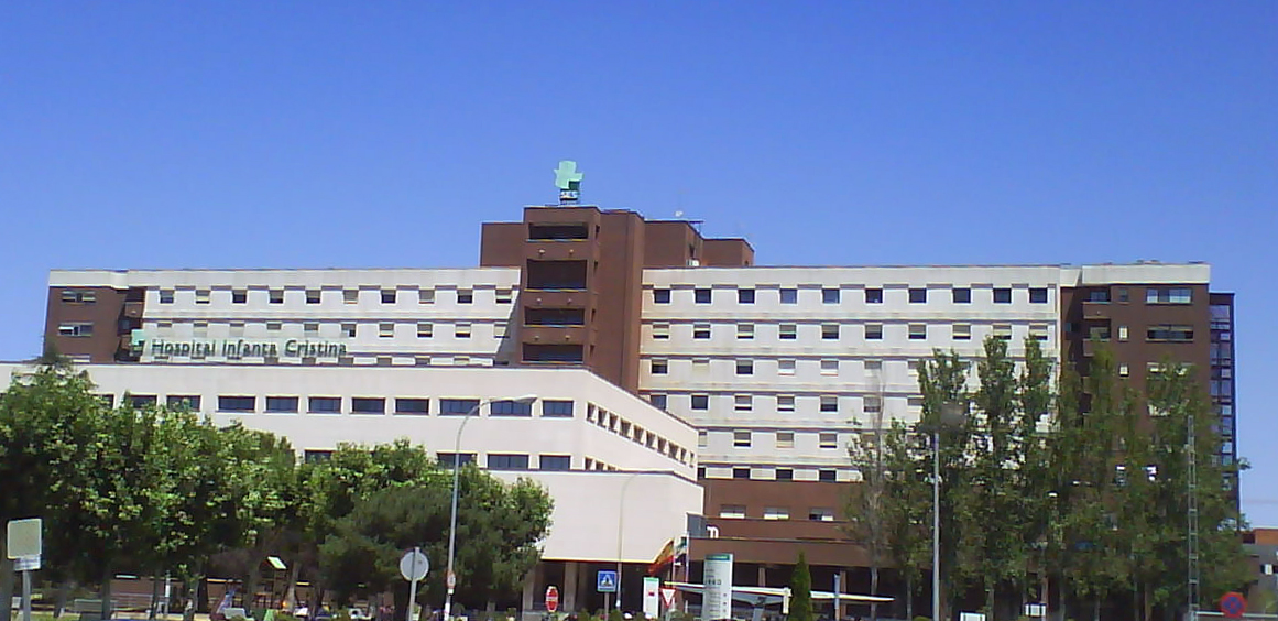 Hospital Infanta Cristina de Badajoz. Foto tomada desde la avenida de Elvas.